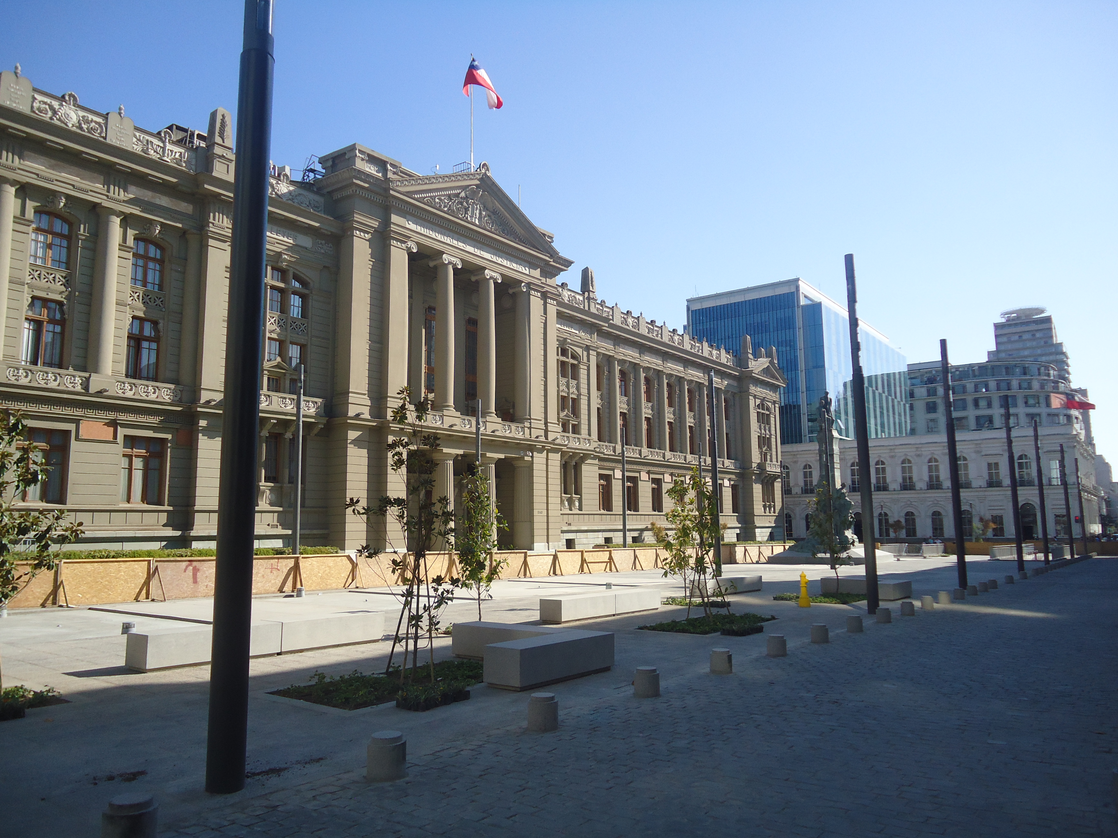 Plaza Montt Varas, Santiago, Chile